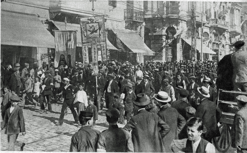 page 8 du journal.